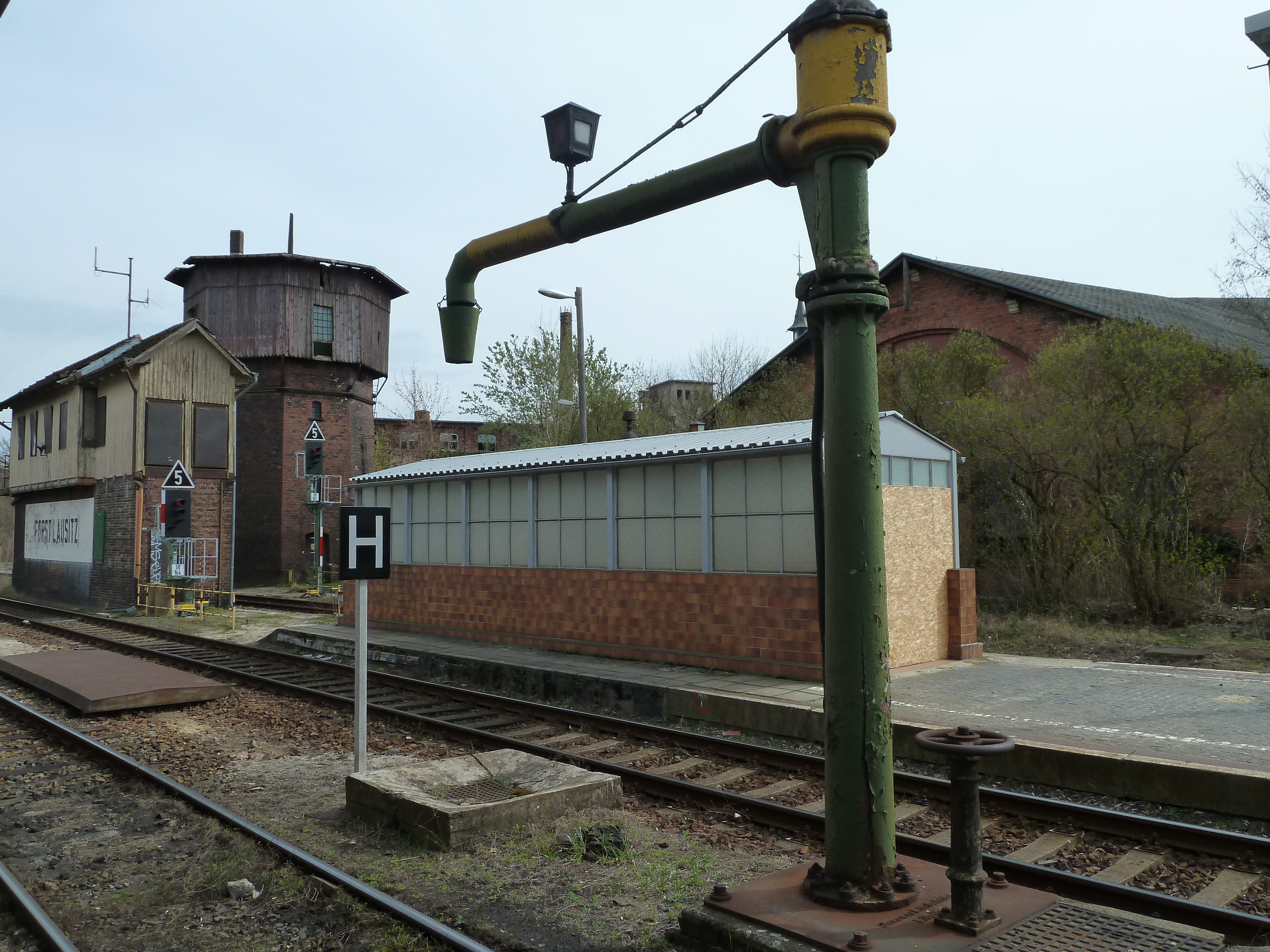 Bahnhof Forst, Wasserkran, im Hintergrund Wasserturm und Stellwerk